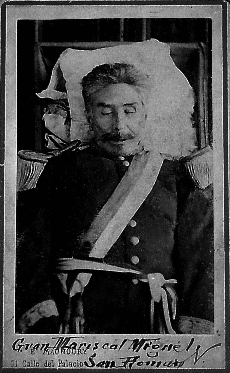 muerto en la Villa de Chorrillos el 3 de abril de 1863. A principios de 1863 el presidente San Román enfermó, trasladándose entonces a su residencia situada en el balneario de Chorrillos, donde continuó trabajando con sus ministros. El 30 de marzo su estado se agravó. Los médicos dijeron haberse equivocado en el diagnóstico: su enfermedad estaba realmente en el hígado y en los riñones.